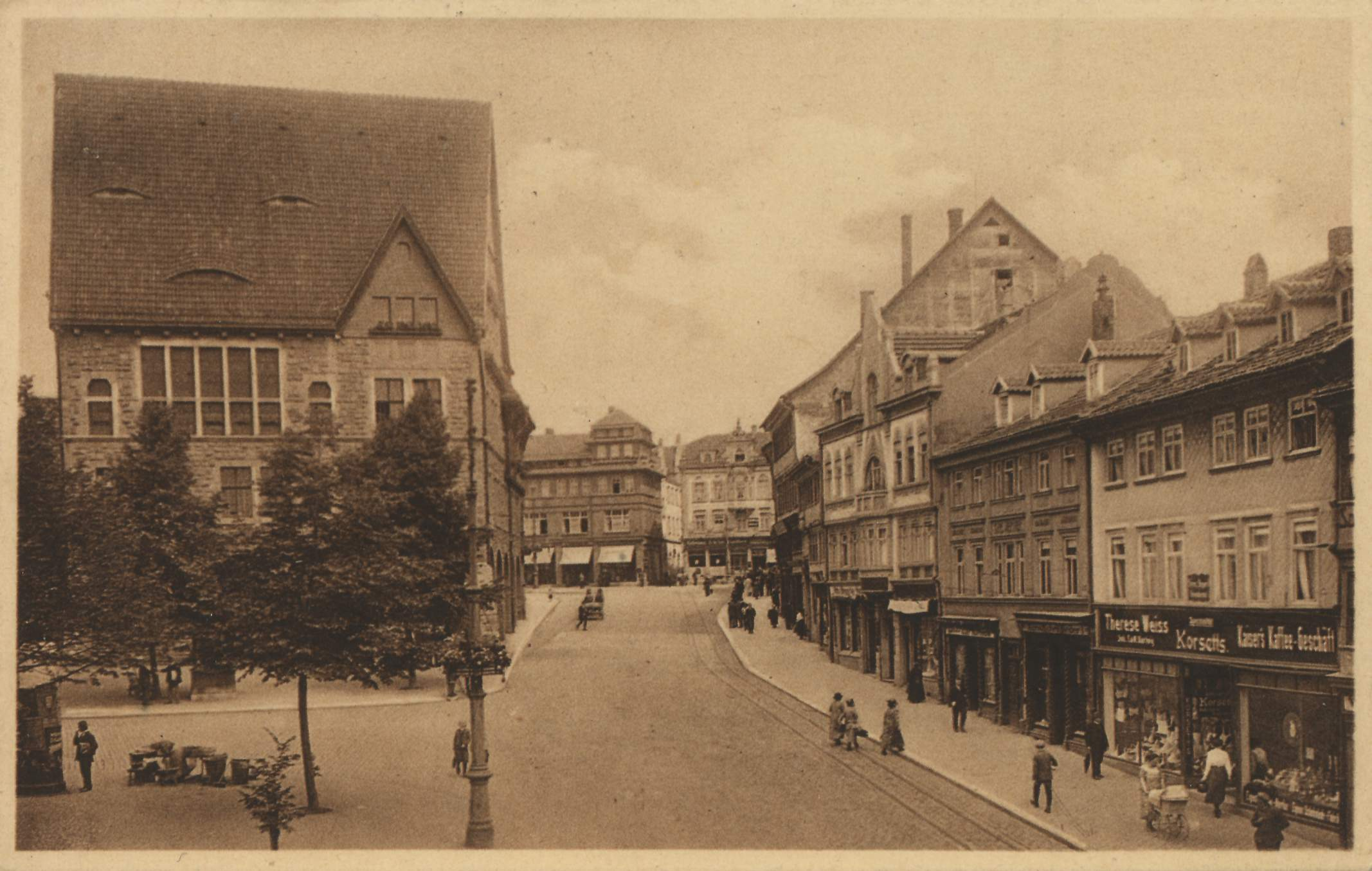 Blick in die Rautenstraße mit dem Stadthaus (Neues Rathaus). Dieser Kernbereich der Altstadt wurde 1945 ein Opfer der Bombenangriffe auf Nordhausen und nach dem Krieg mit zeitgenössischer Bebauung ersetzt